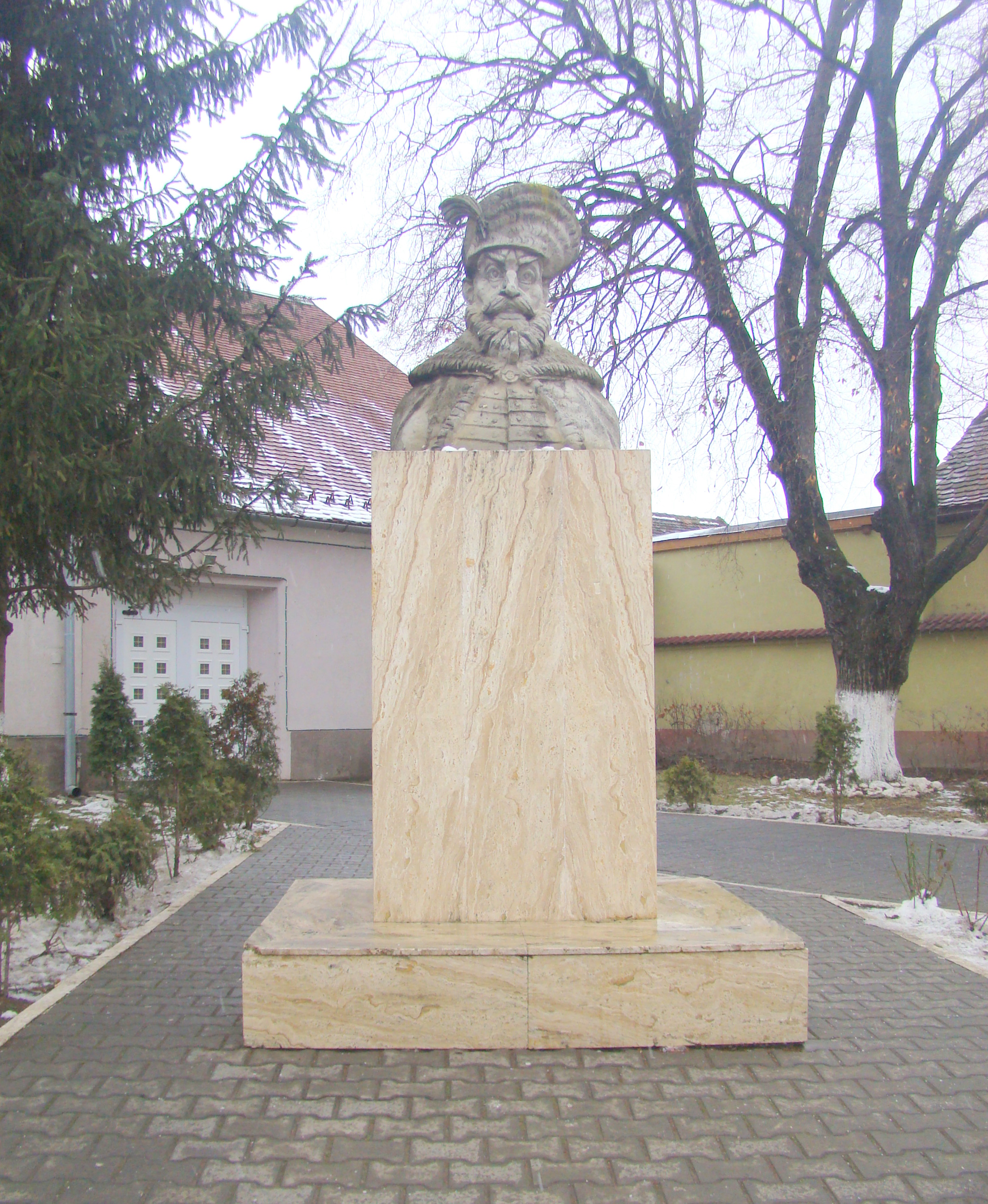 Bustul domnitorului Mihai Viteazul din Șelimbăr, județul Sibiu